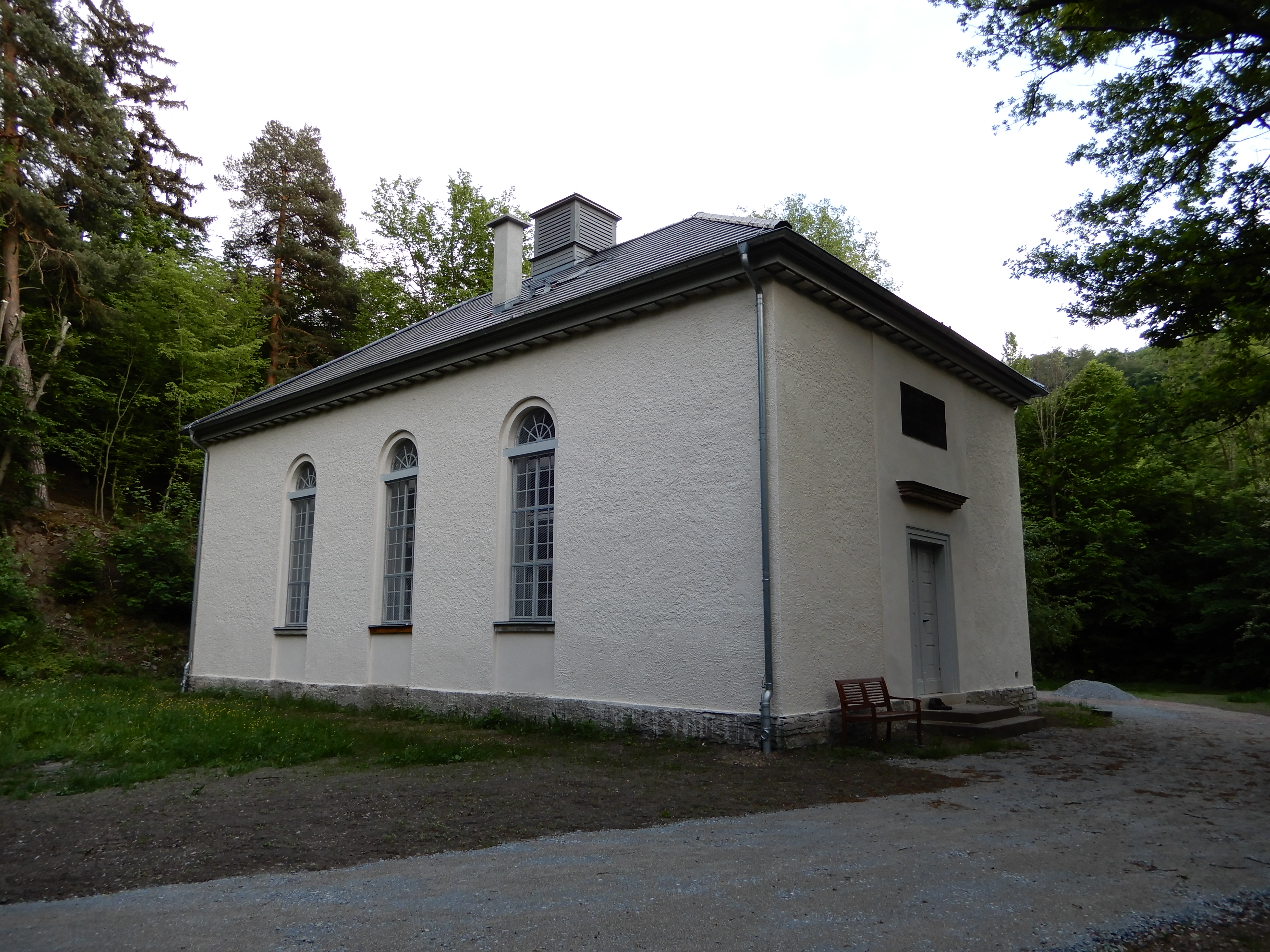 St. Markus Kirche in Mägdesprung